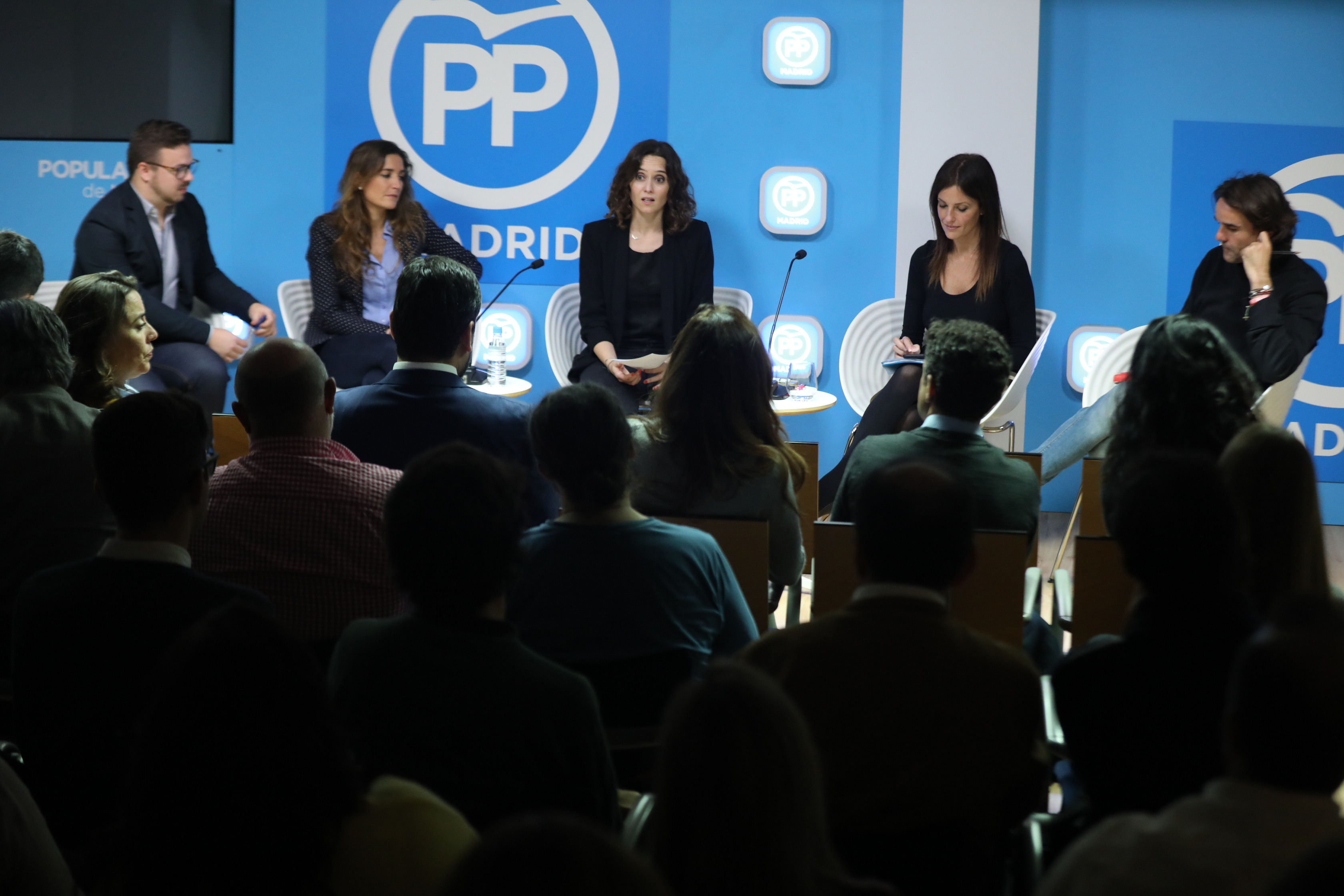 Cake Minuesa, David Enguita, Raquel Sanz, Cristina Seguí y Carlos Garcia. Sala de Tuits: Ataque en las Redes.